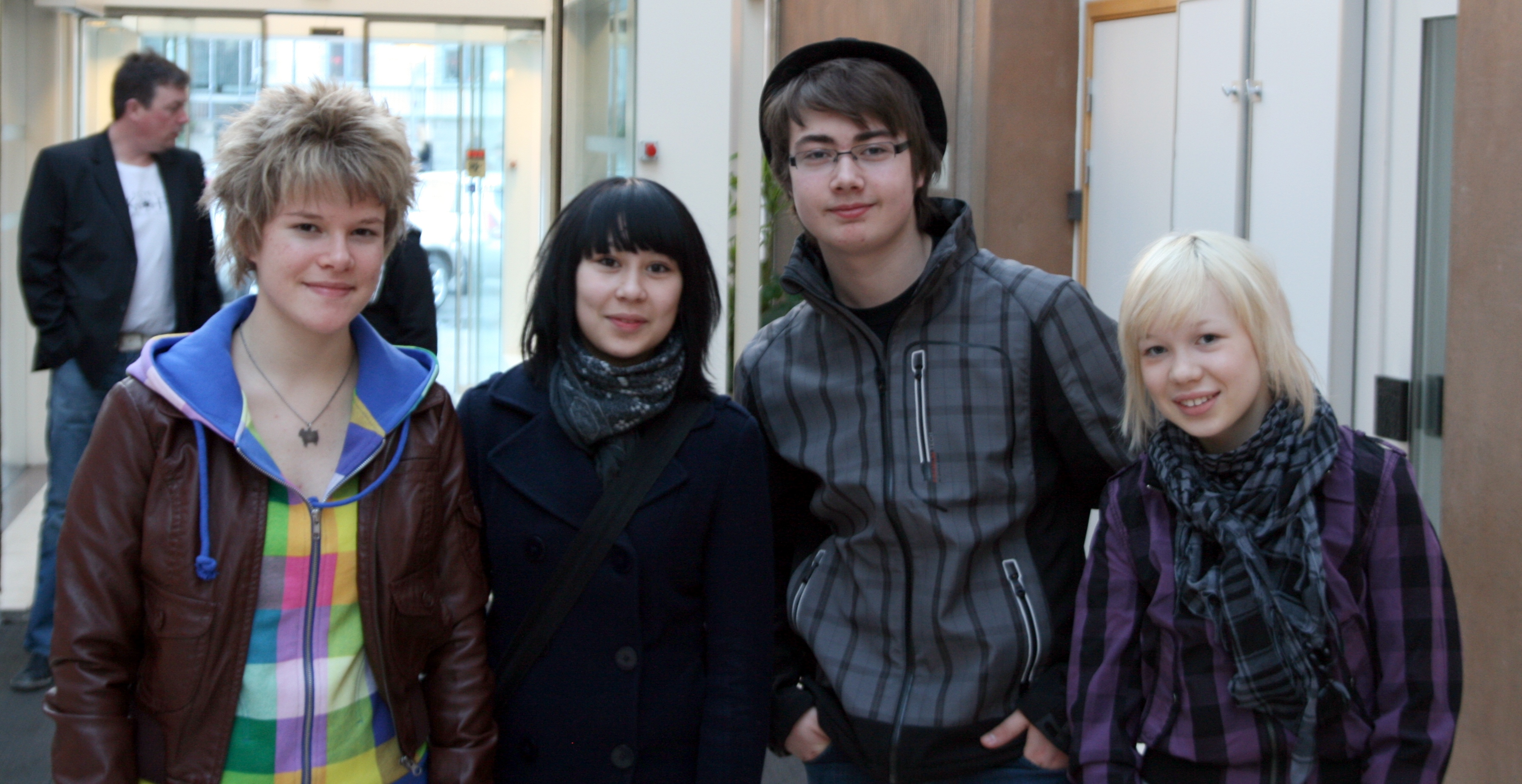 Medlemmane i gruppa The BlackSheeps: Viktoria Eriksen, Emelie Nilsen, Alexander Touryguin og Agnete Kristin Johnsen.